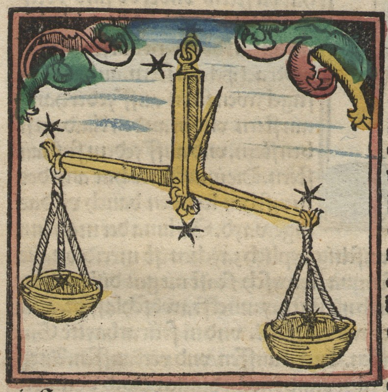 Original image description from the Deutsche Fotothek Astrologie & Sternzeichen & Kalender